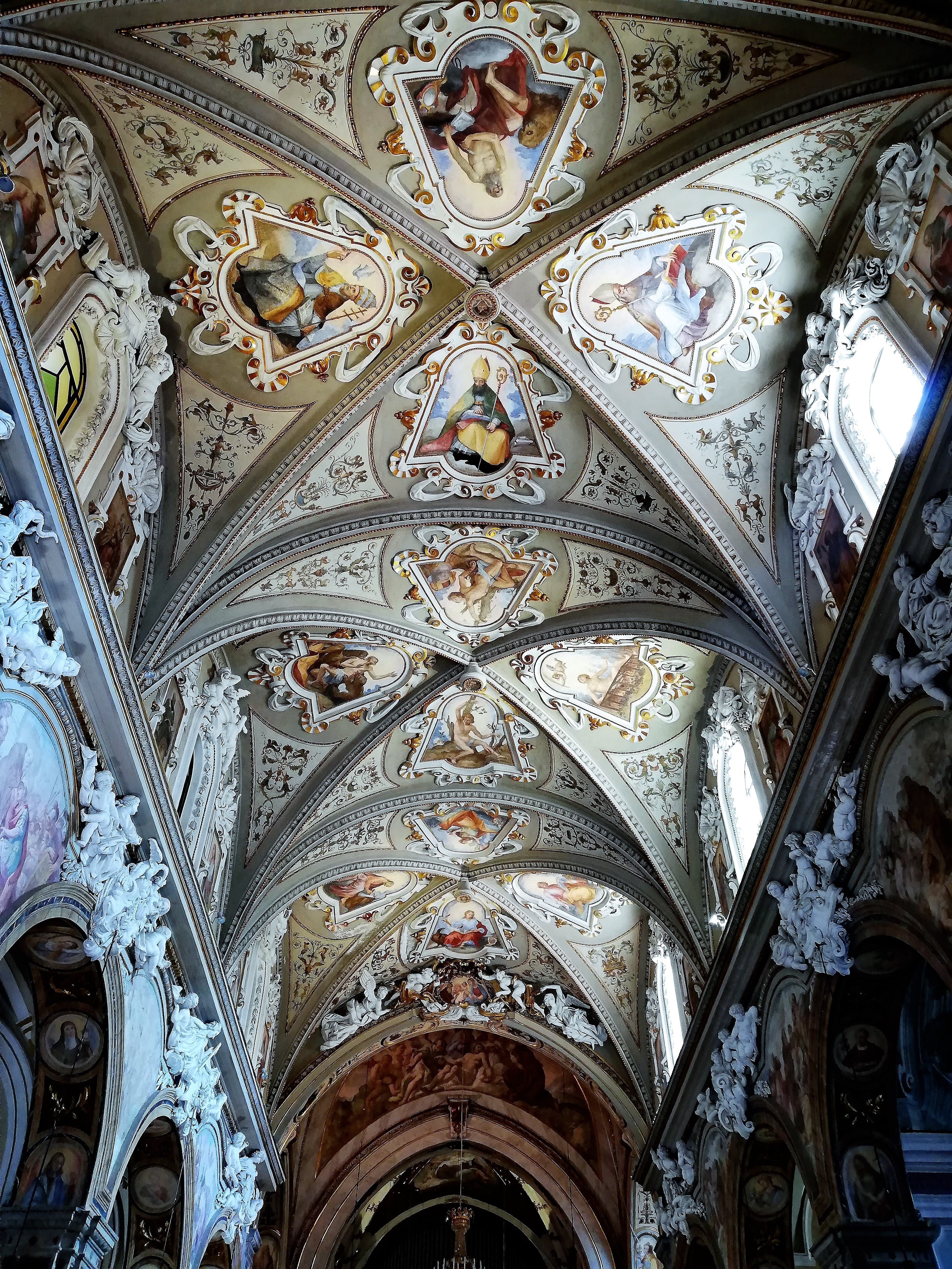 Volta.